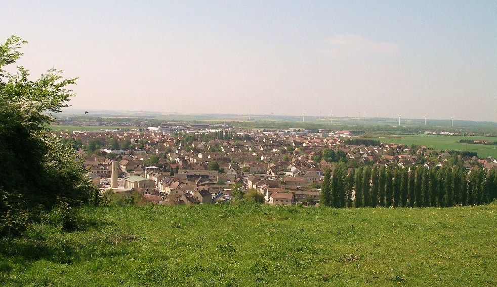 Vue sur la commune d'Argences (Calvados)